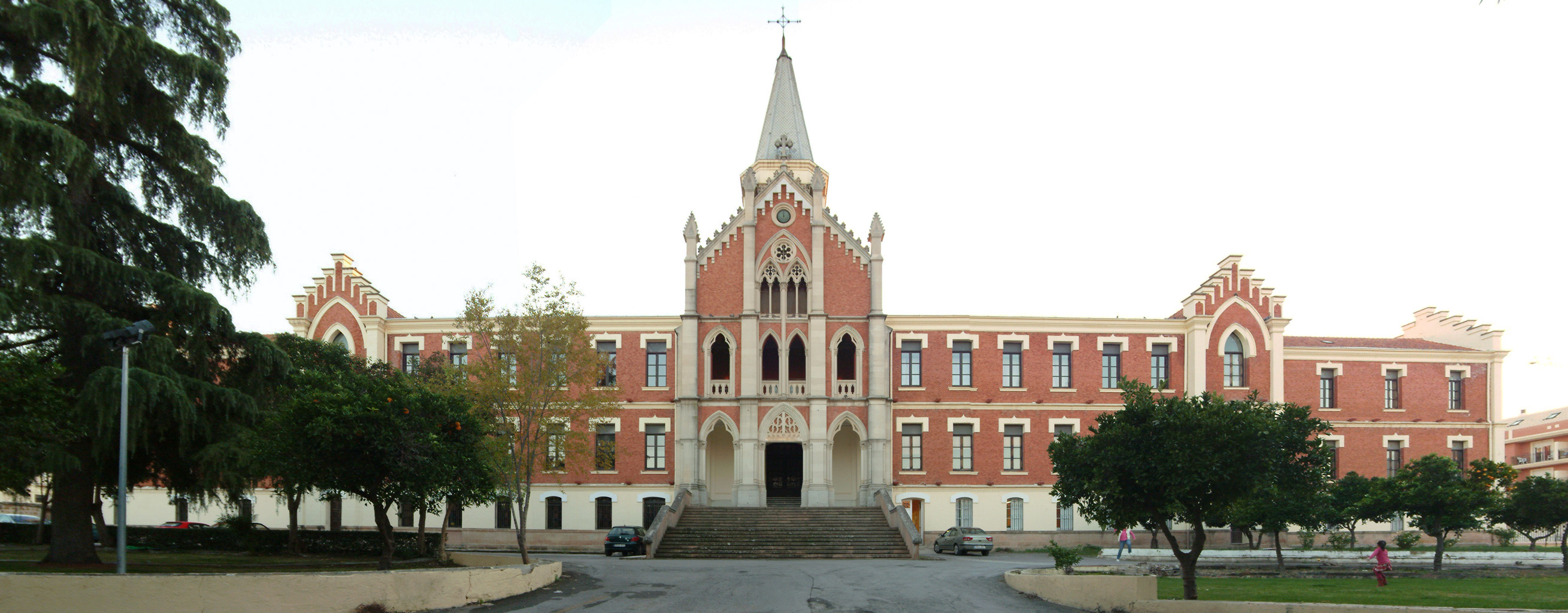 Exterior de los Marqueses de Linares (Linares) tras aplicarle un filtro rectilinear